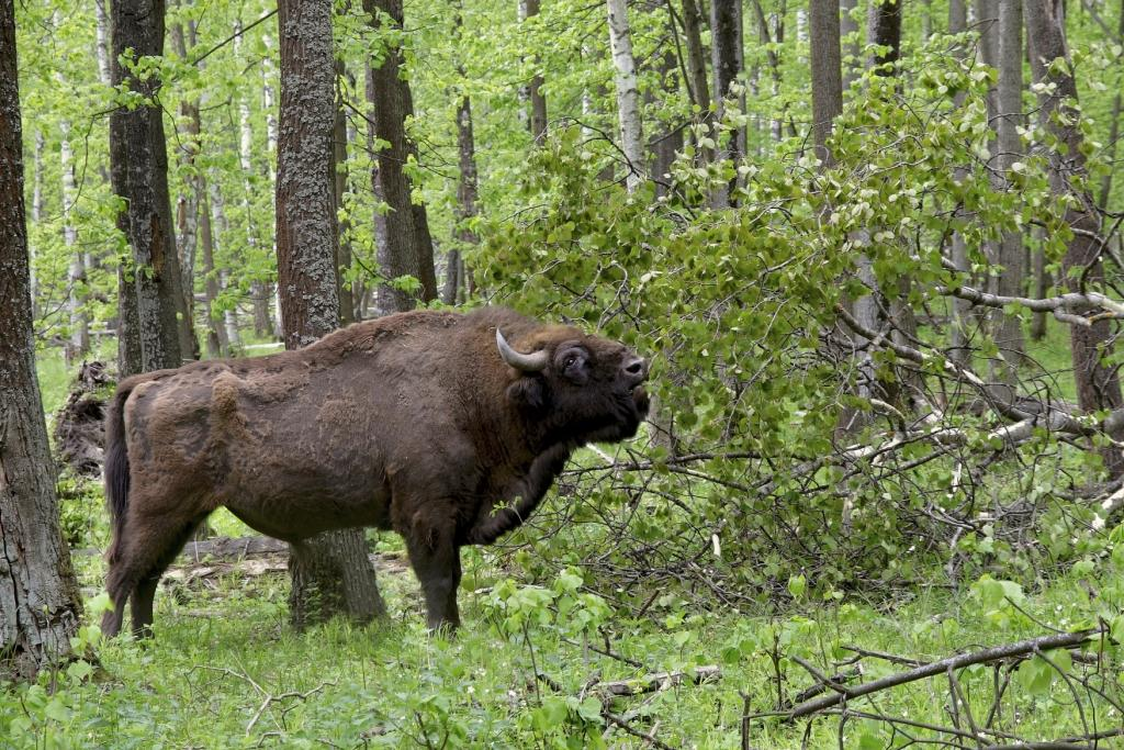 Зубр в Приокско-Террасном заповеднике